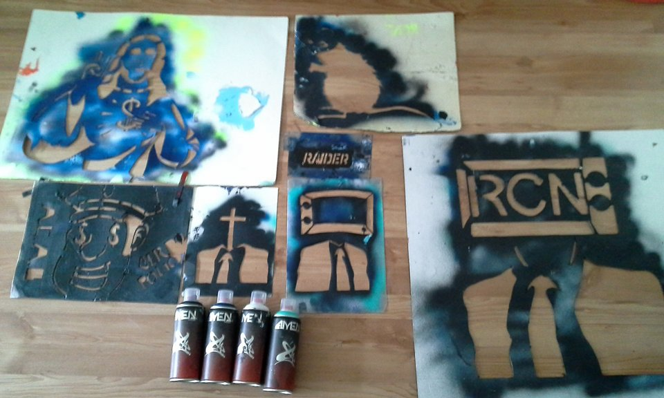 ejemplo de plantillas que se usan para hacer estarcido (plantillas subidas por Raider a su pagina de facebook)